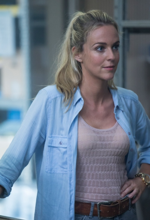 Miranda Raison sur le plateau en Decembre 2014